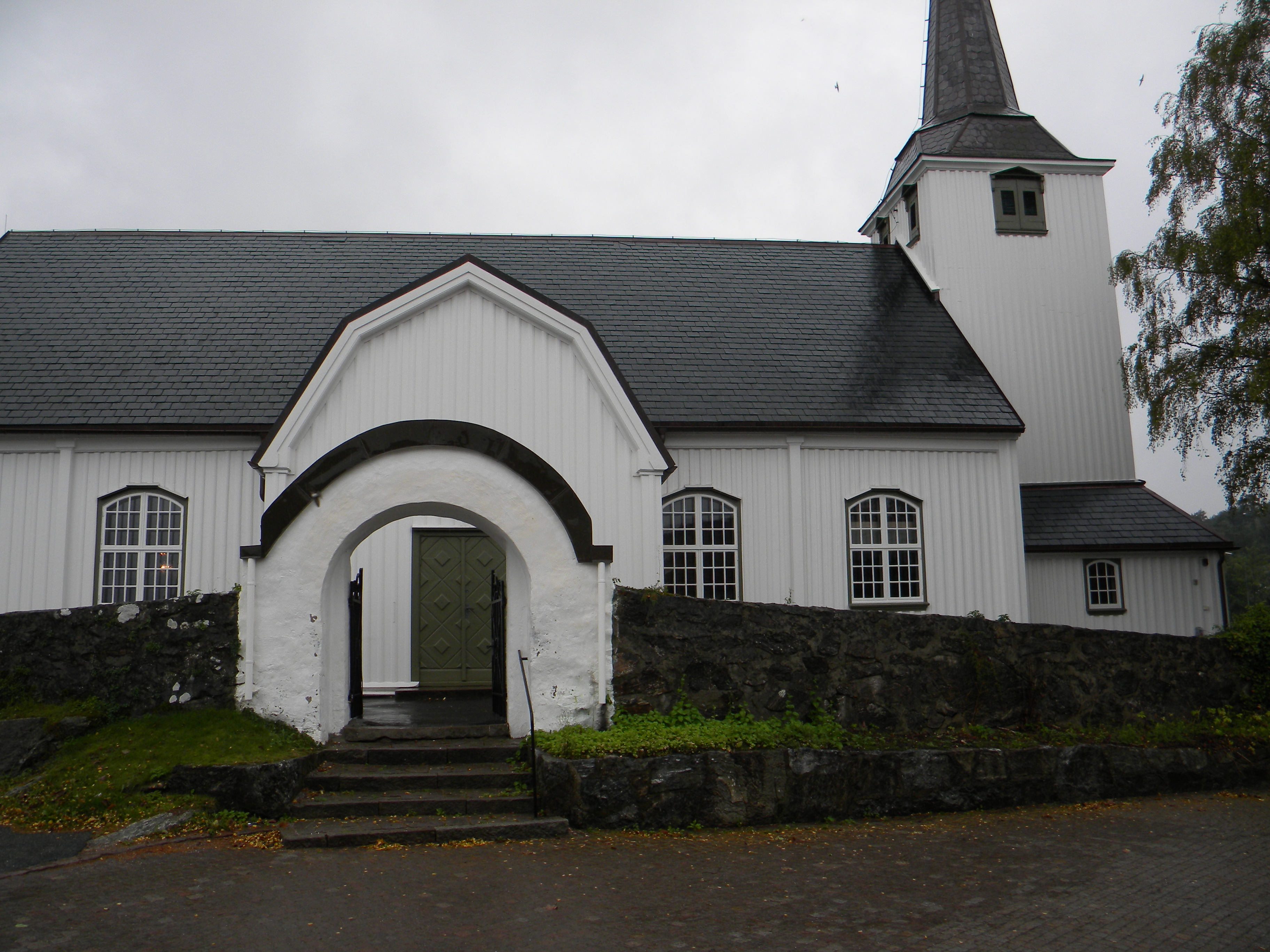 Fiskebäckskils kyrka